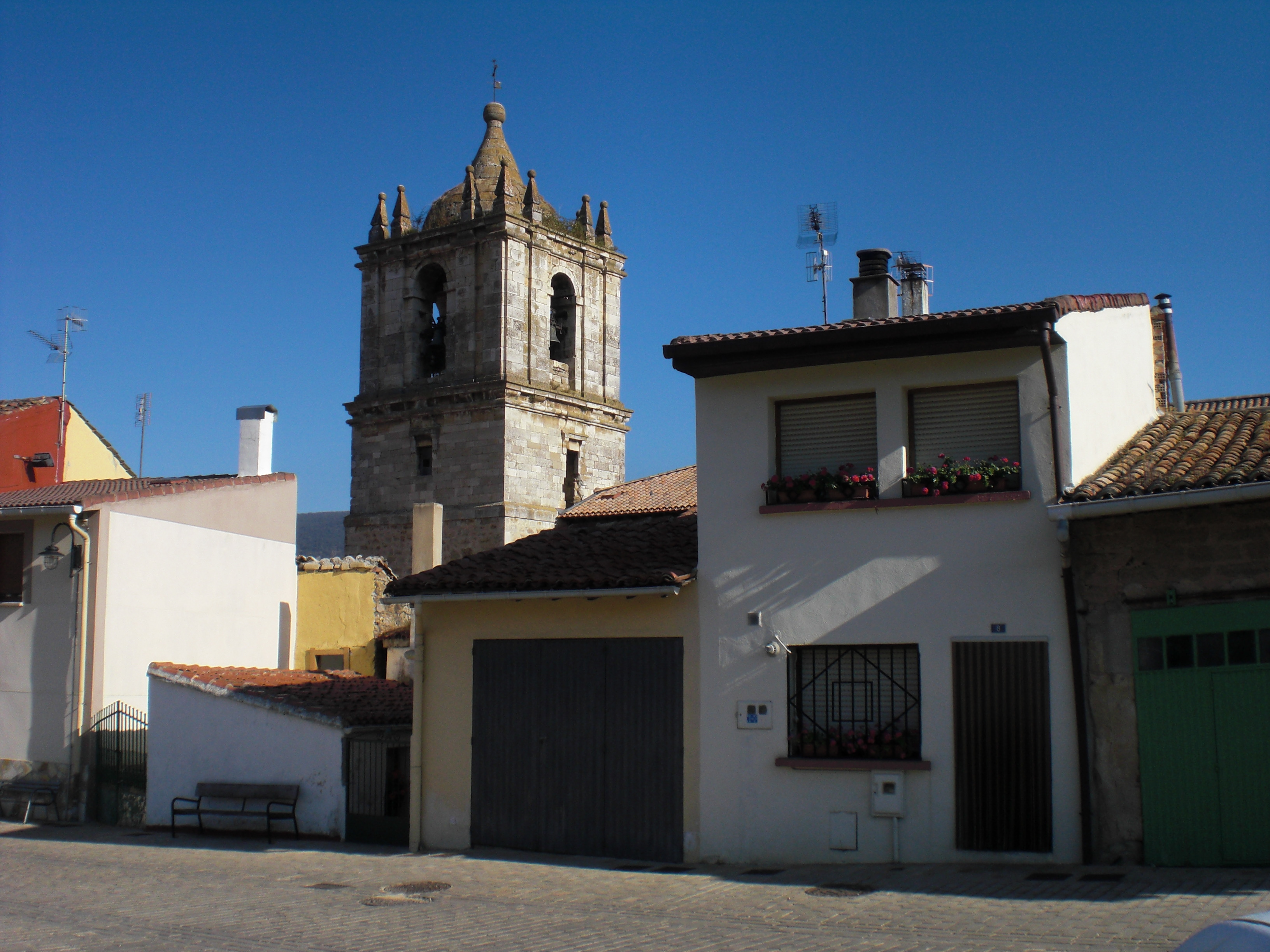 Santikurutze Kanpezuren ikuspegia, Gazteluaren plazatik.